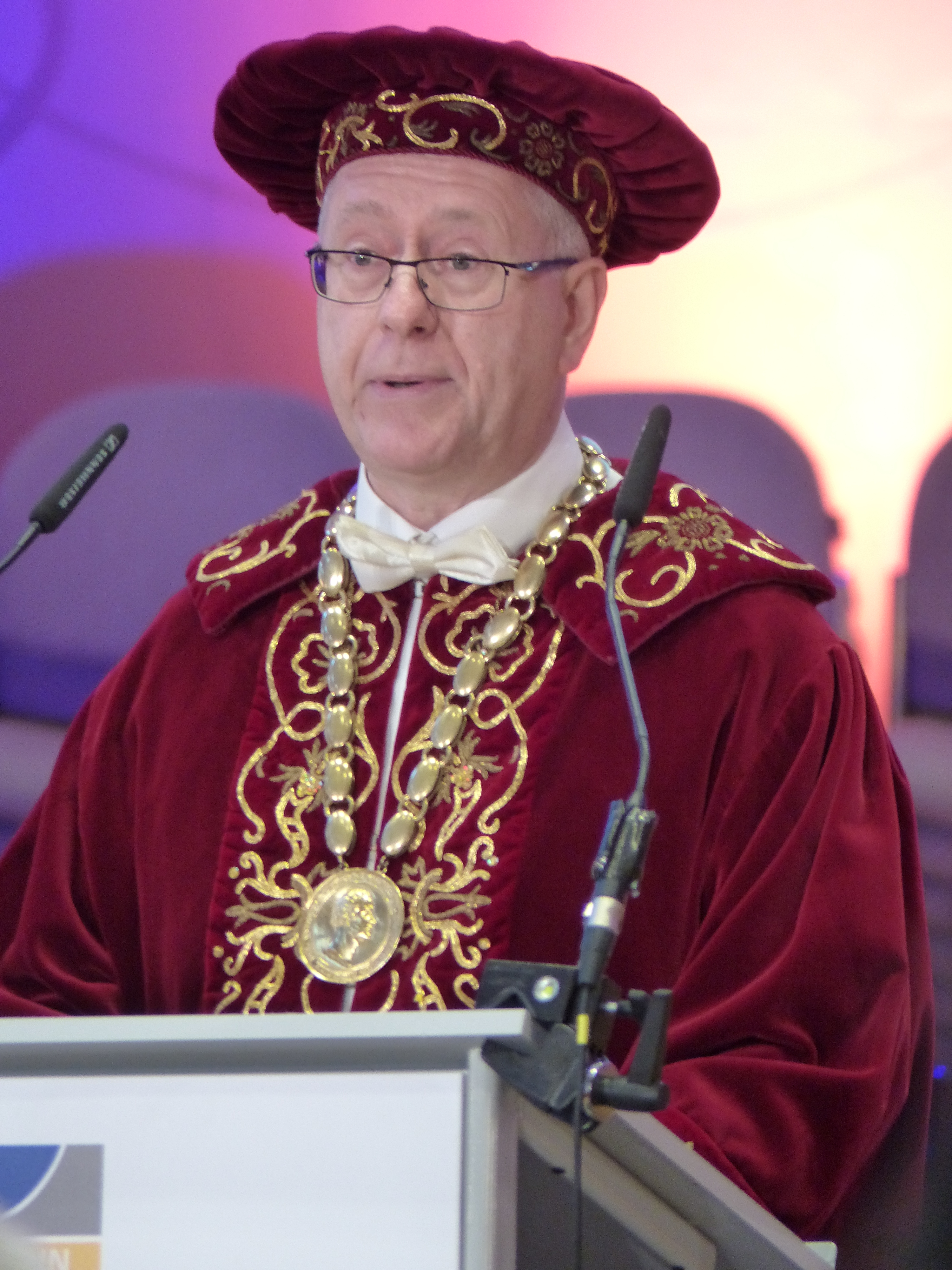 Michael Hoch, Rektor der Universität Bonn, bei der feierlichen Eröffnung des Akademischen Jahres 2019/20